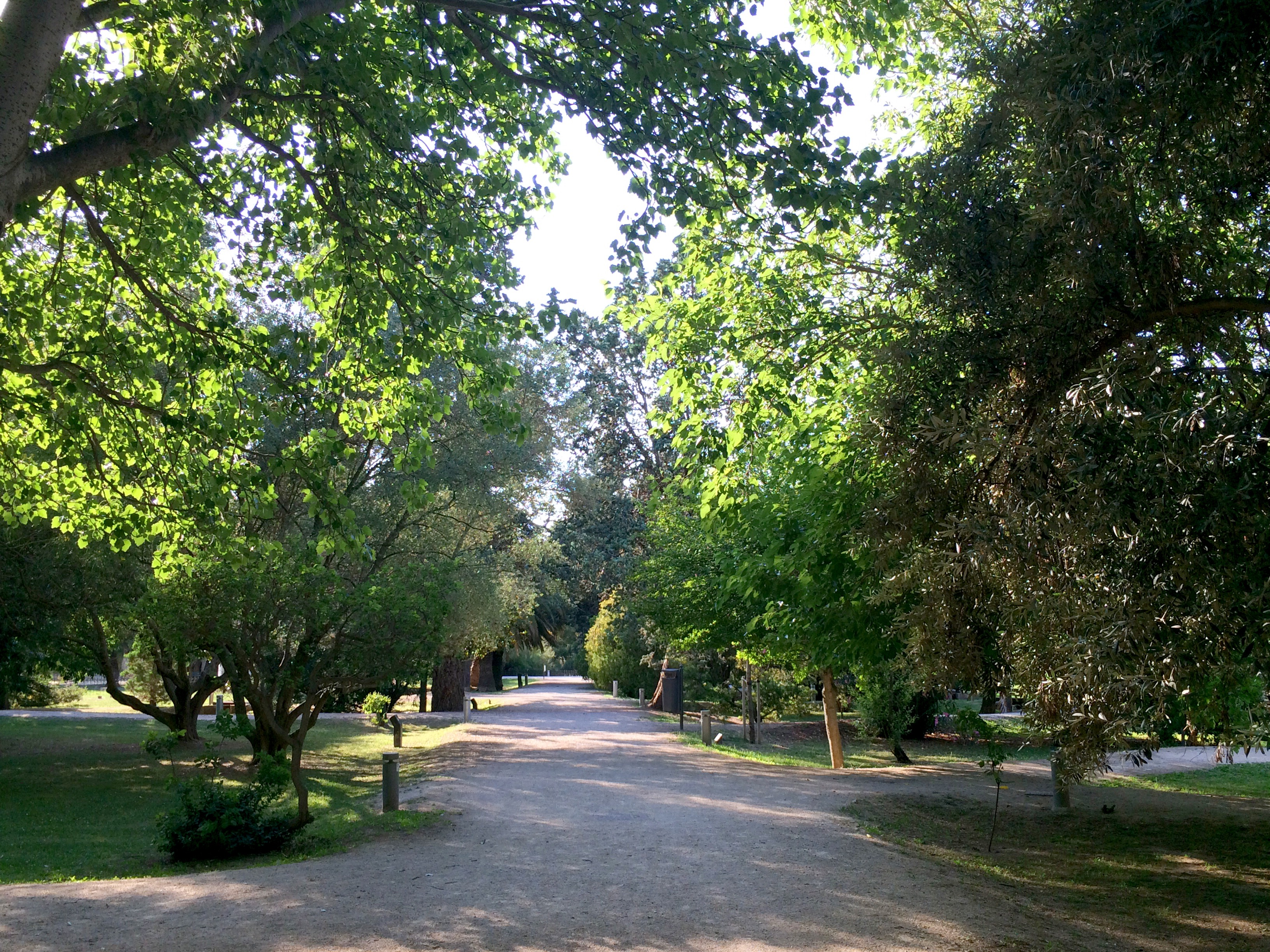 Jardín Botánico del Parque Grande (Zaragoza)